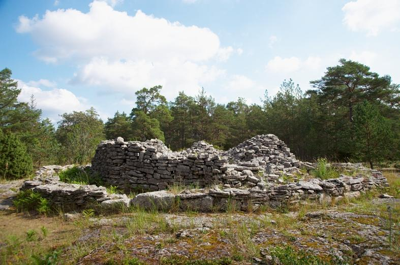 Lärbro 127:1. Röset har varit ca 3 m högt och 18 m i diameter. Den inre består av ett 2,5 m högt uppmurat torn. Innanför fann man två kistor av stenhällar. Av rösets yttre återstår idag endast en halmeterhög mur runt tornet. Motiv: Lärbro 127:1 Kategori: Röse Lärbro 127:1. Röset har varit ca 3 m högt och 18 m i diameter. Den inre består av ett 2,5 m högt uppmurat torn. Innanför fann man två kistor av stenhällar. Av rösets yttre återstår idag endast en halmeterhög mur runt tornet. Lärbro 127:1.